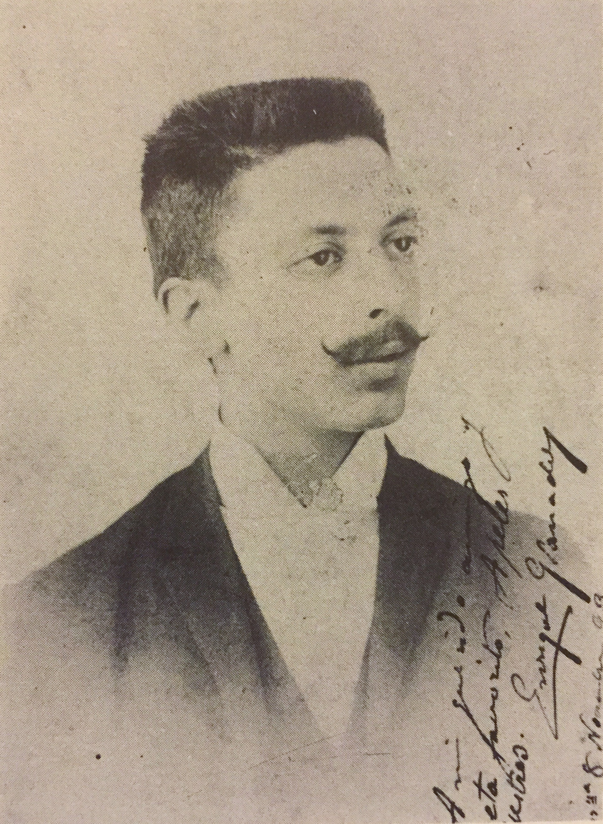 Enric Granados el 1893 en una foto d'Antoni Esplugas (Barcelona)